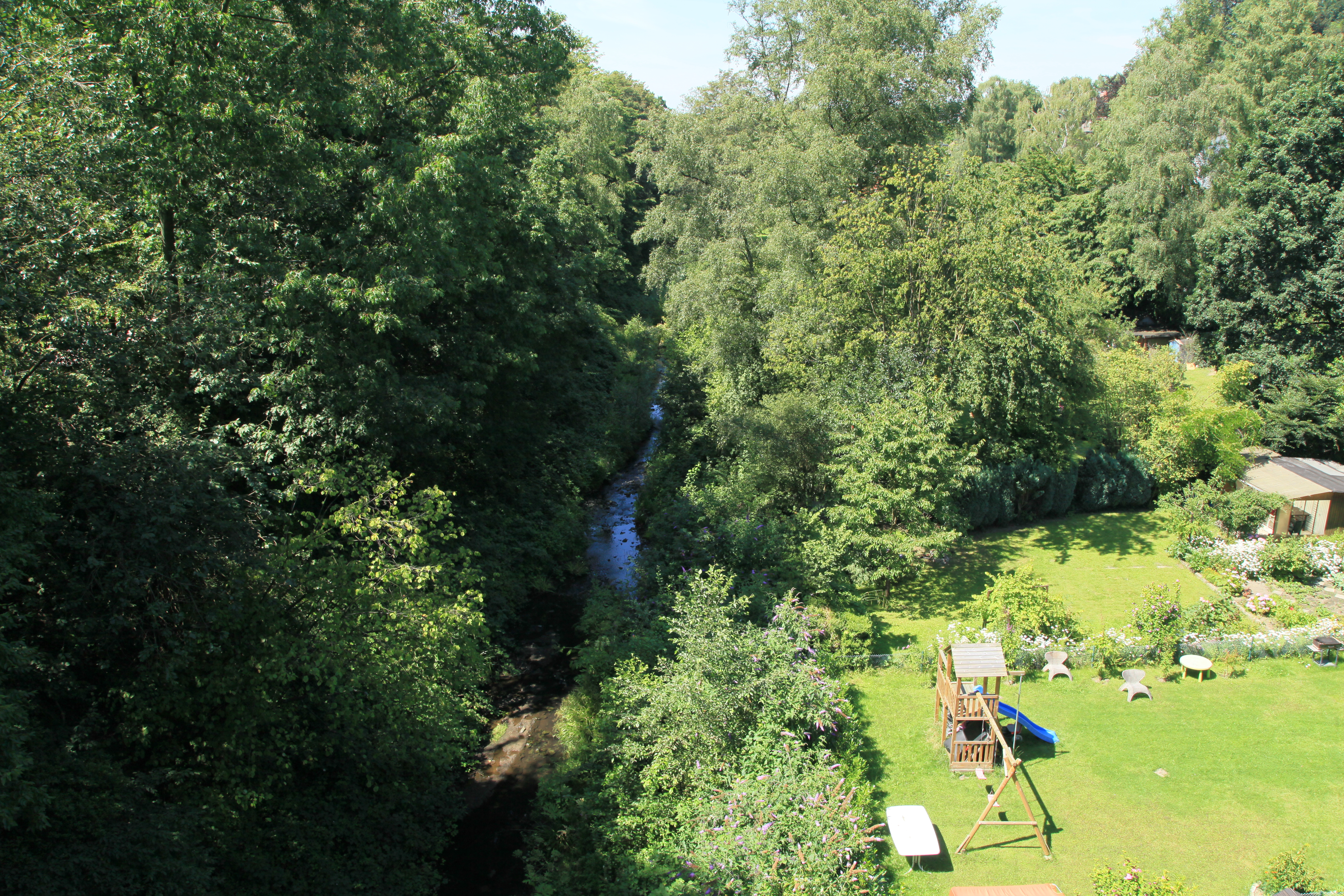 Blick von der Brücke Mühlenbachtal auf Am Mühlenbach und den Borbecker Mühlenbach in Essen